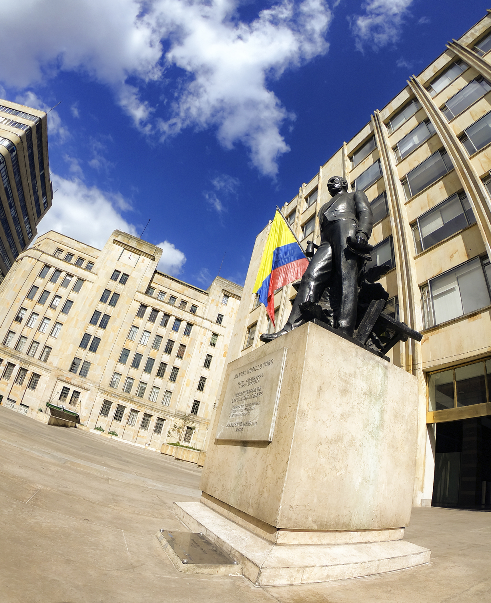 Entrada del Edificio Murillo Toro por la carrera 8